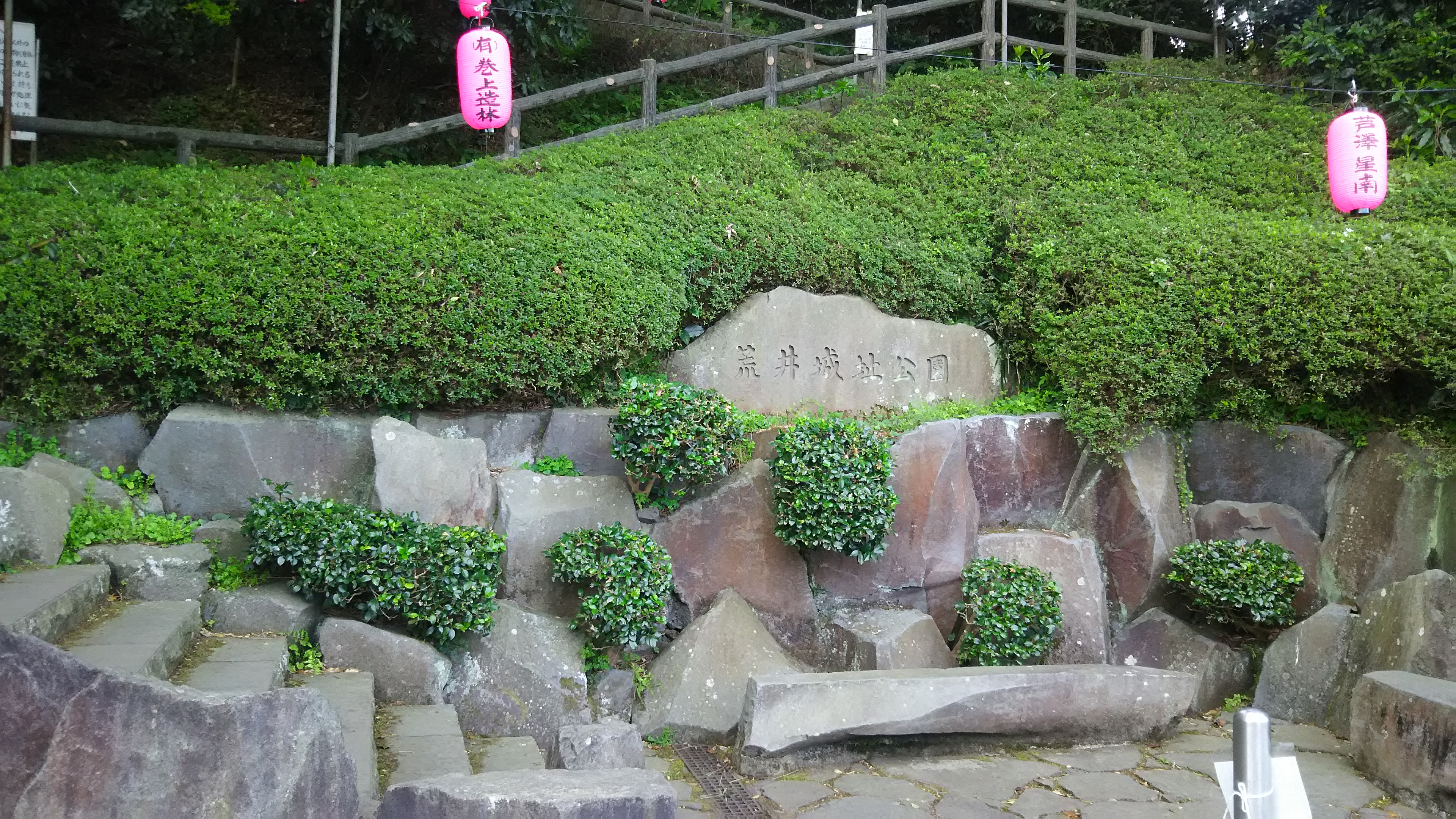 真鶴駅側、真鶴岬付け根